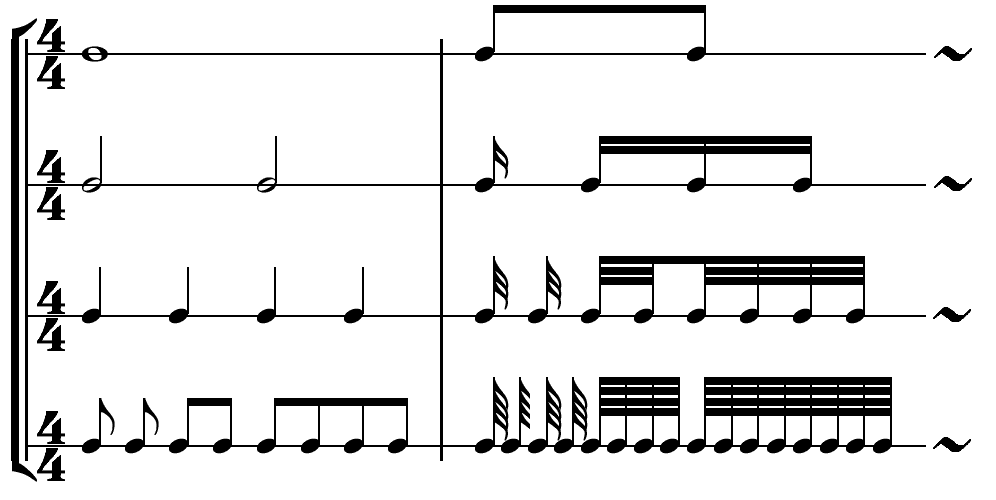 Notenwerte der Musik